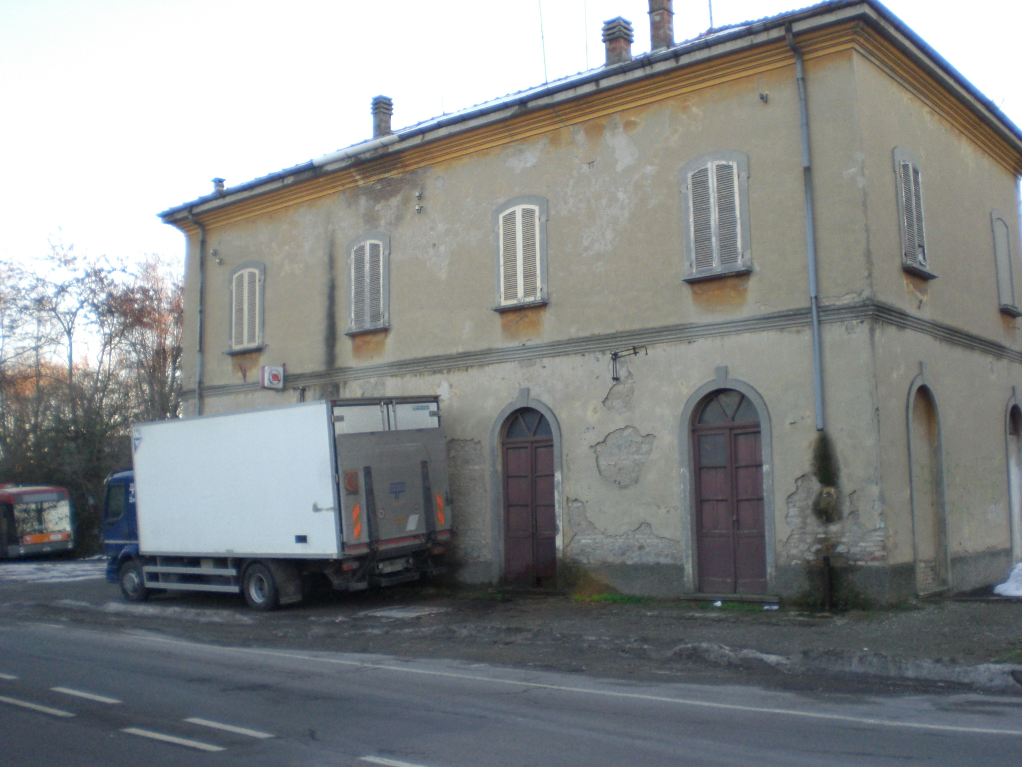 L'ex stazione ferroviaria CCFR di Montecchio Emilia (RE)